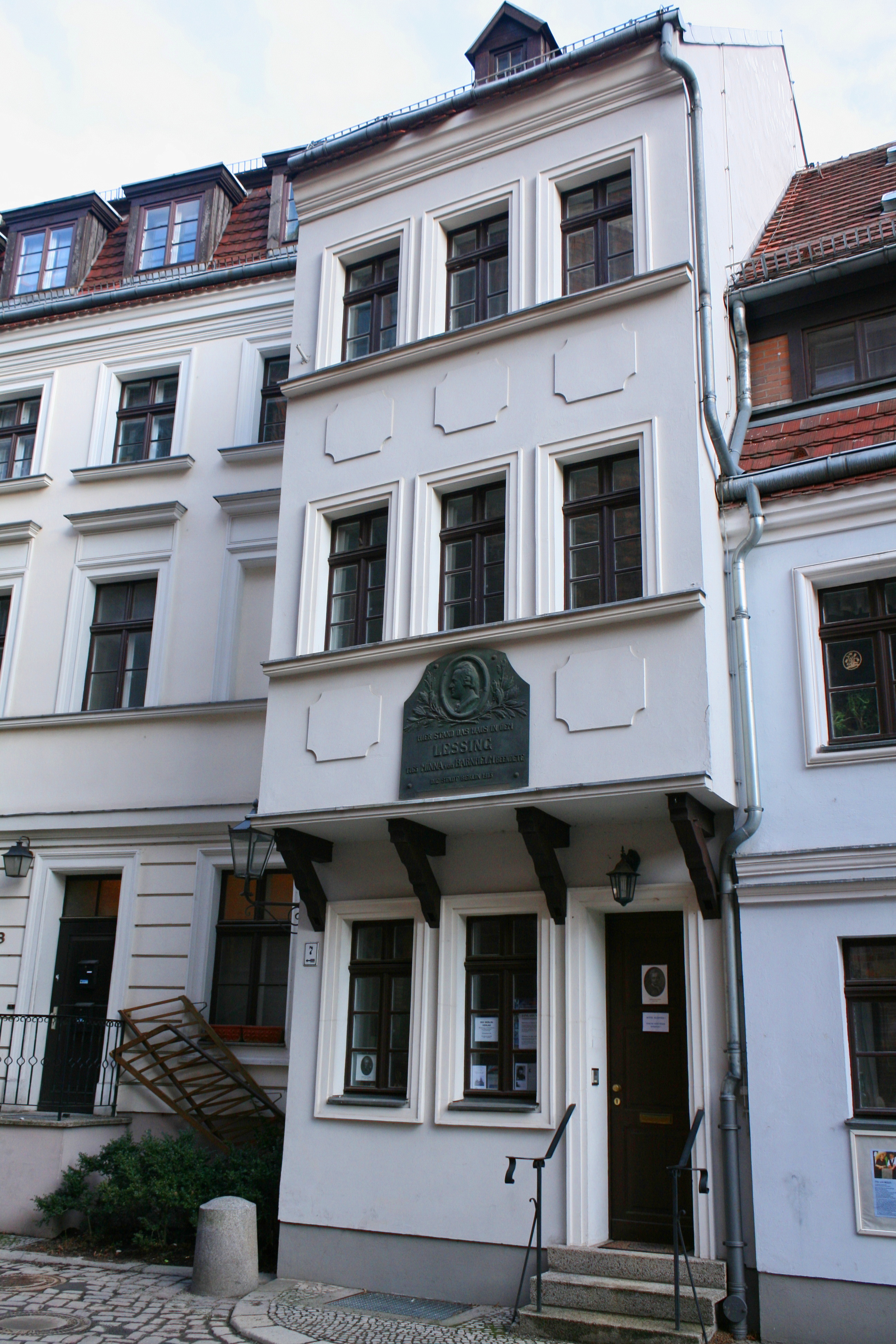 Das sogenannte Lessinghaus in Berlin-Mitte, Nikolaiviertel, Nikolaikirchplatz 7